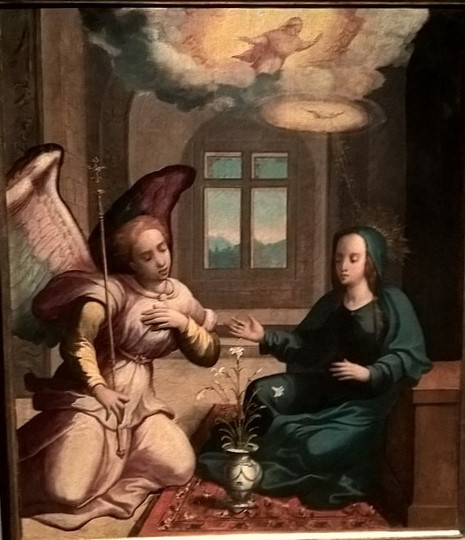 Anunciação, painel do antigo Retábulo da Igreja de S. Brás do Campanário, de 1545-50, de Diogo de Contreiras. Actualmente no Museu de Arte Sacra do Funchal.